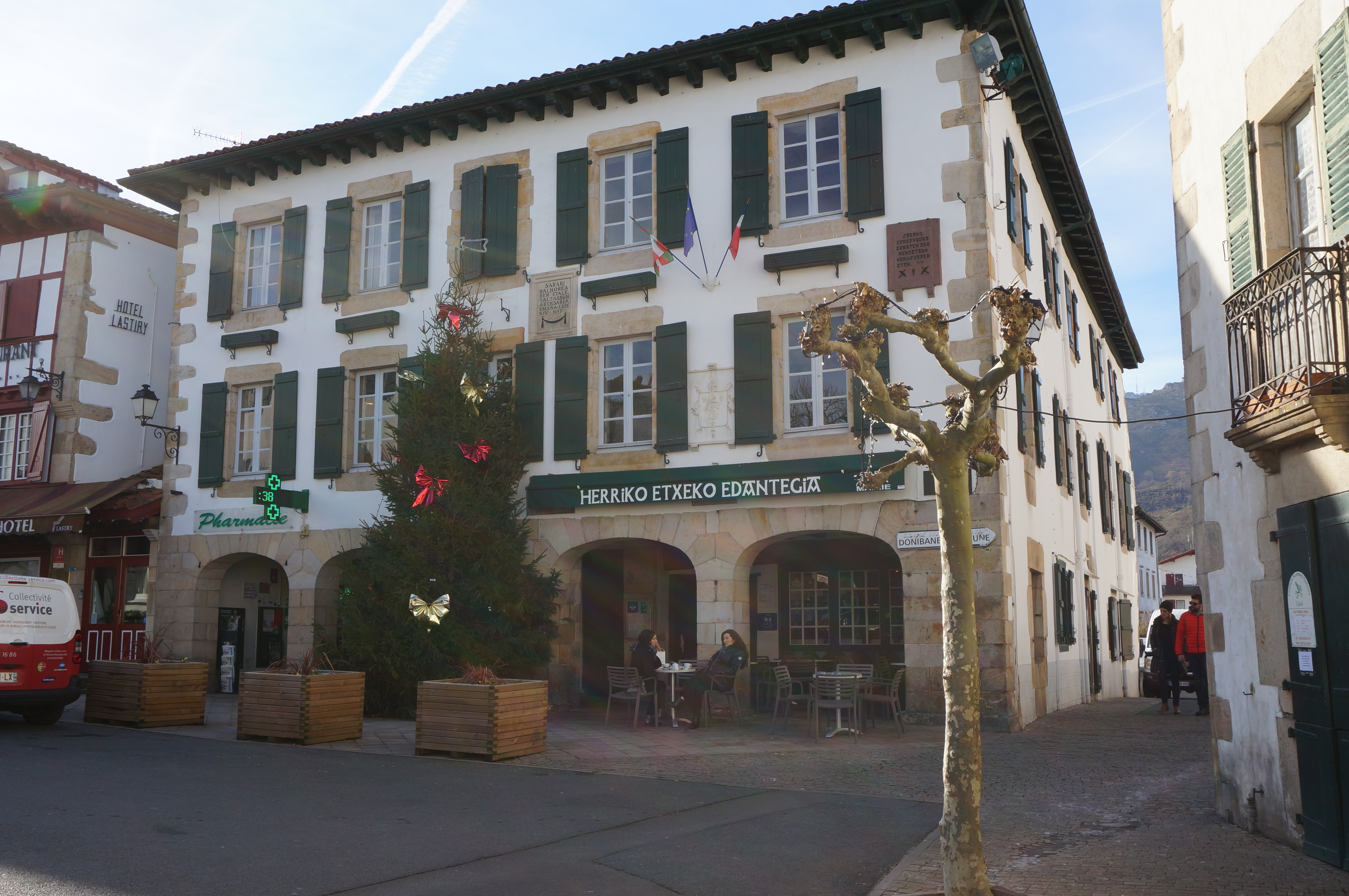 Mairie de Sare